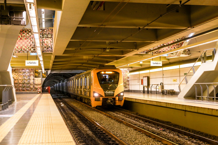 Alstom 300 en la estación Córdoba de la línea H